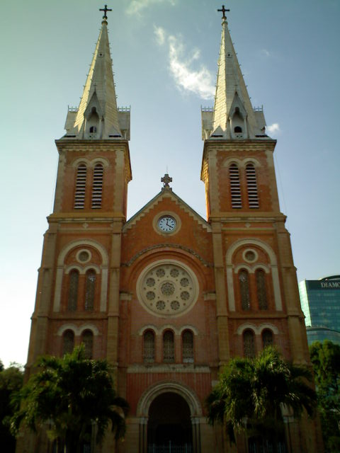 胡志明市紅教堂